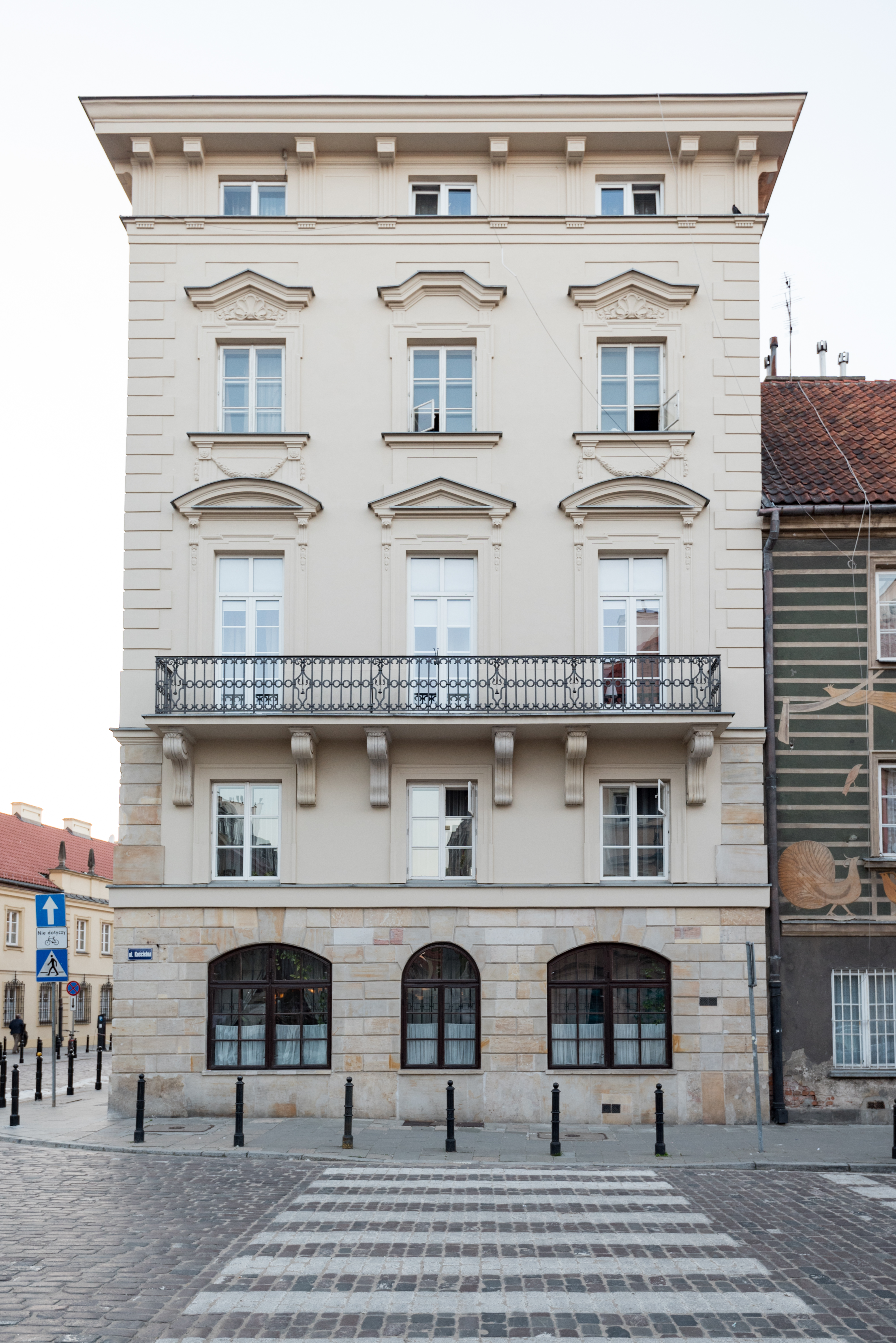 Warszawa, ul. Zakroczymska 2